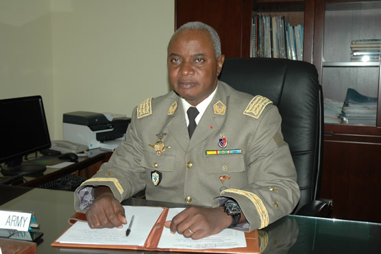 Général de Division Mahamane TOURE, Directeur Général de l’Ecole de Maintien de la Paix